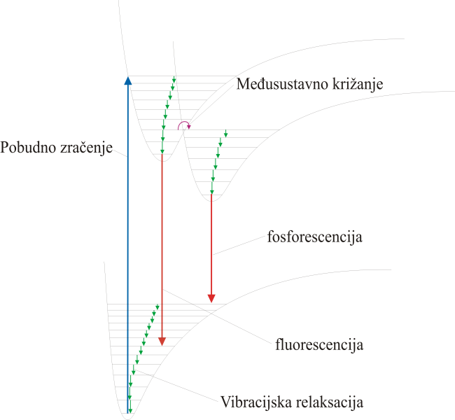 slika prikazuje elektronske sustave osnovnog i dva pobu?ena stanja (jedno singletno i jedno tripletno), te mehanizam fluorescencije i fosforescnecije